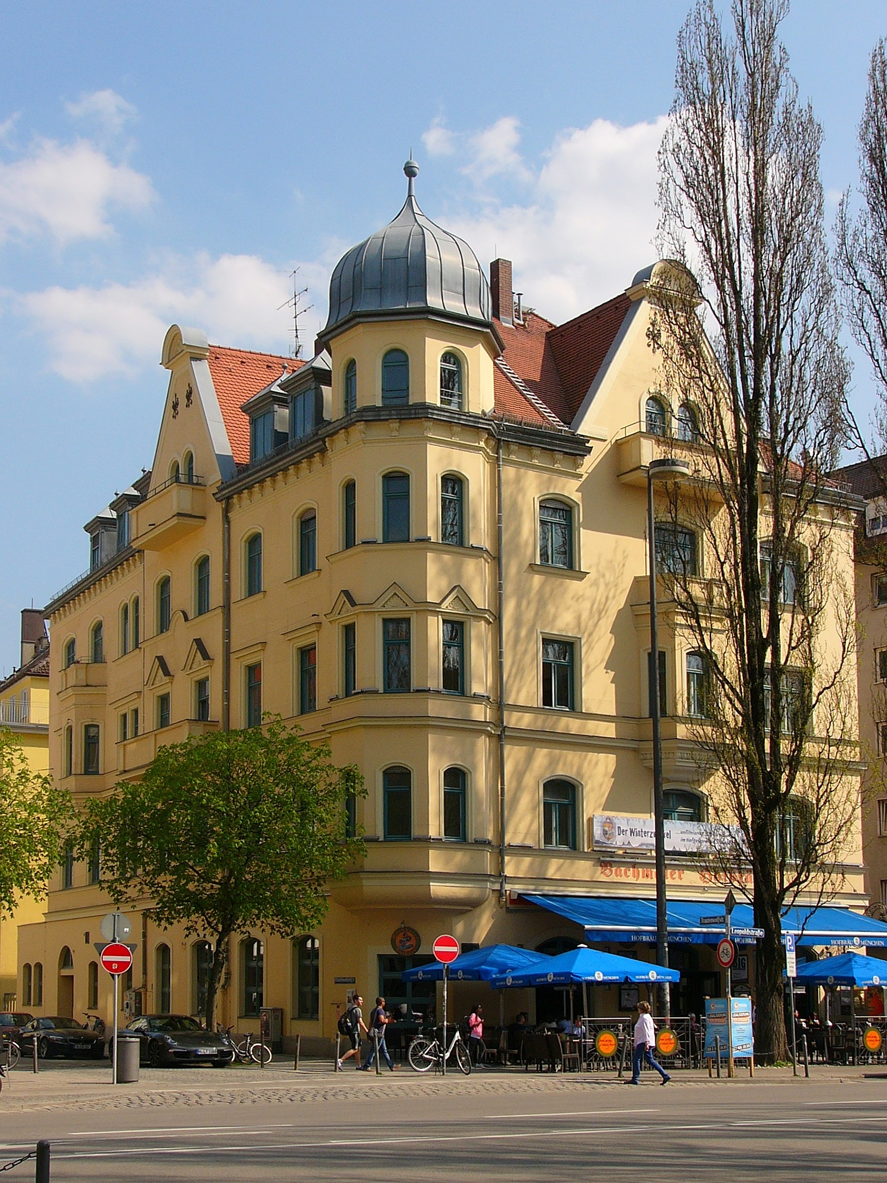 Eckhaus; deutsche Renaissance, reich gegliedert, mit Erkerturm an der Ecke, 1899–1900; mit Gaststätte, ehem. als Papa Benz berühmt. This is a photograph of an architectural monument.